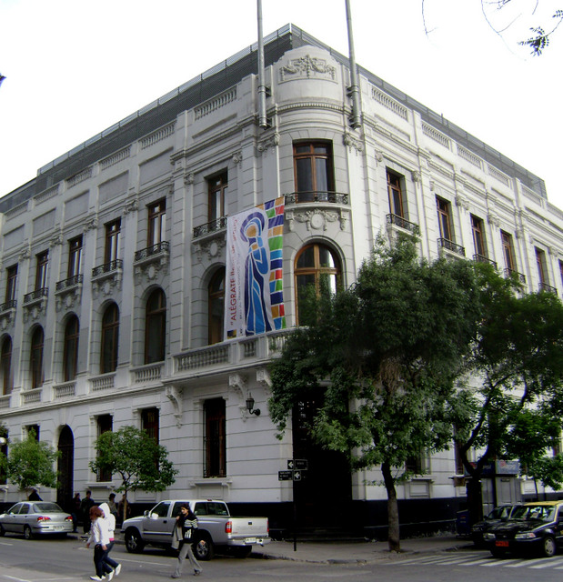 Edificio Eguiguren, actual Sede DUOC UC